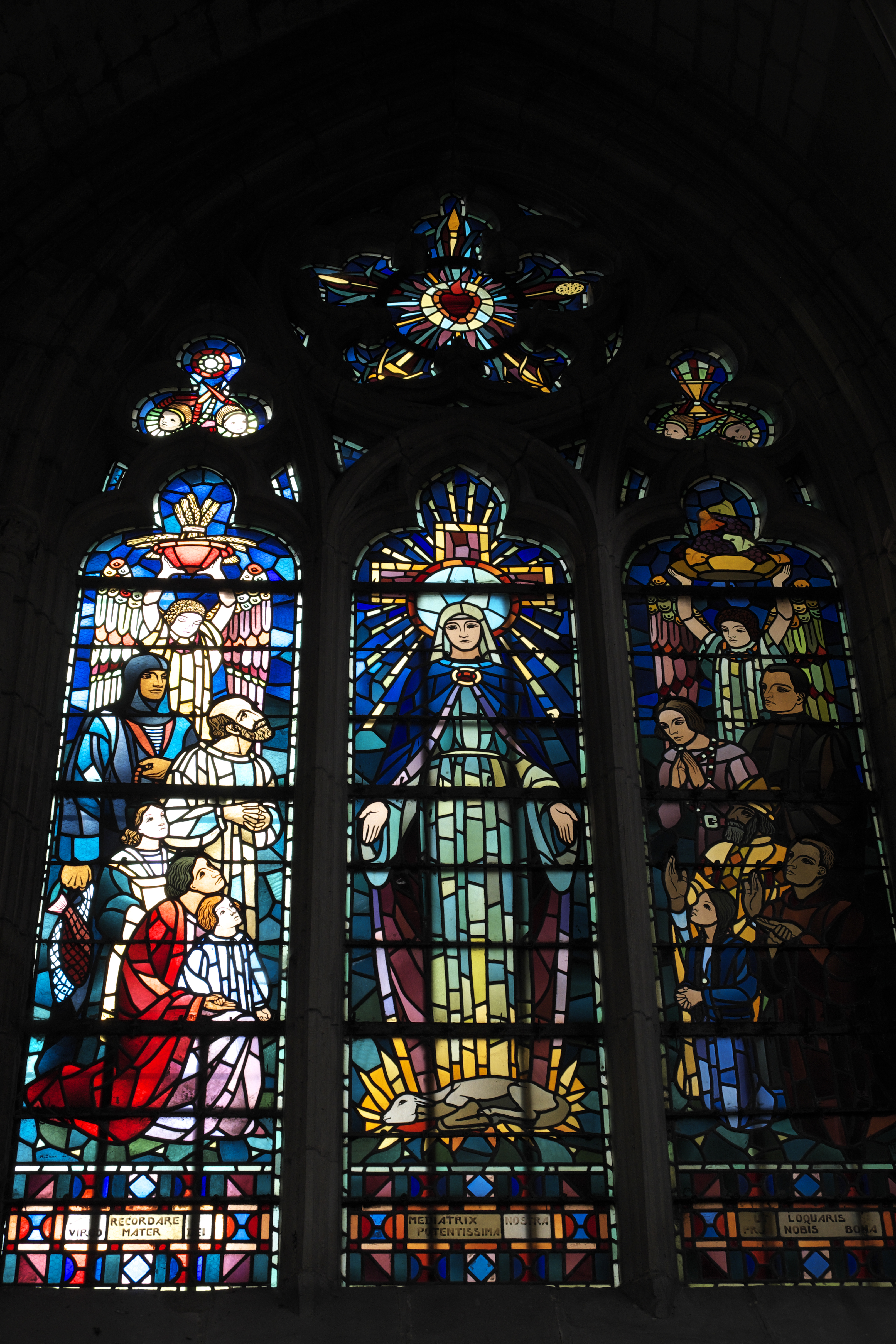 Basilika Notre-Dame in L’Épine (Marne) im Département Marne (Champagne-Ardenne/Frankreich), Bleiglasfenster mit der Signatur: M. Dano, Darstellung: Mater Mediatrix